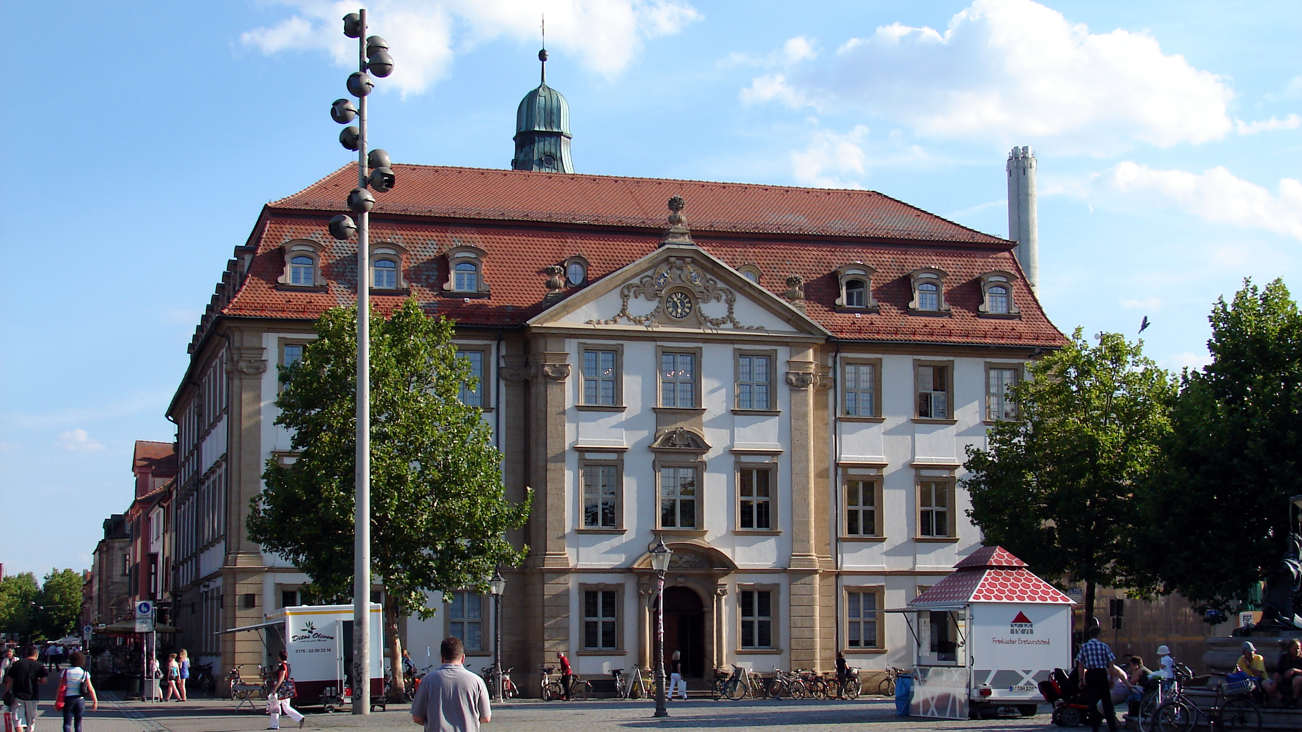 Das Stutterheim'sche Palais, diente in den Jahren 1836-1971 als Rathaus und beherbergt heute das Kunstpalais und eine Bibliothek.